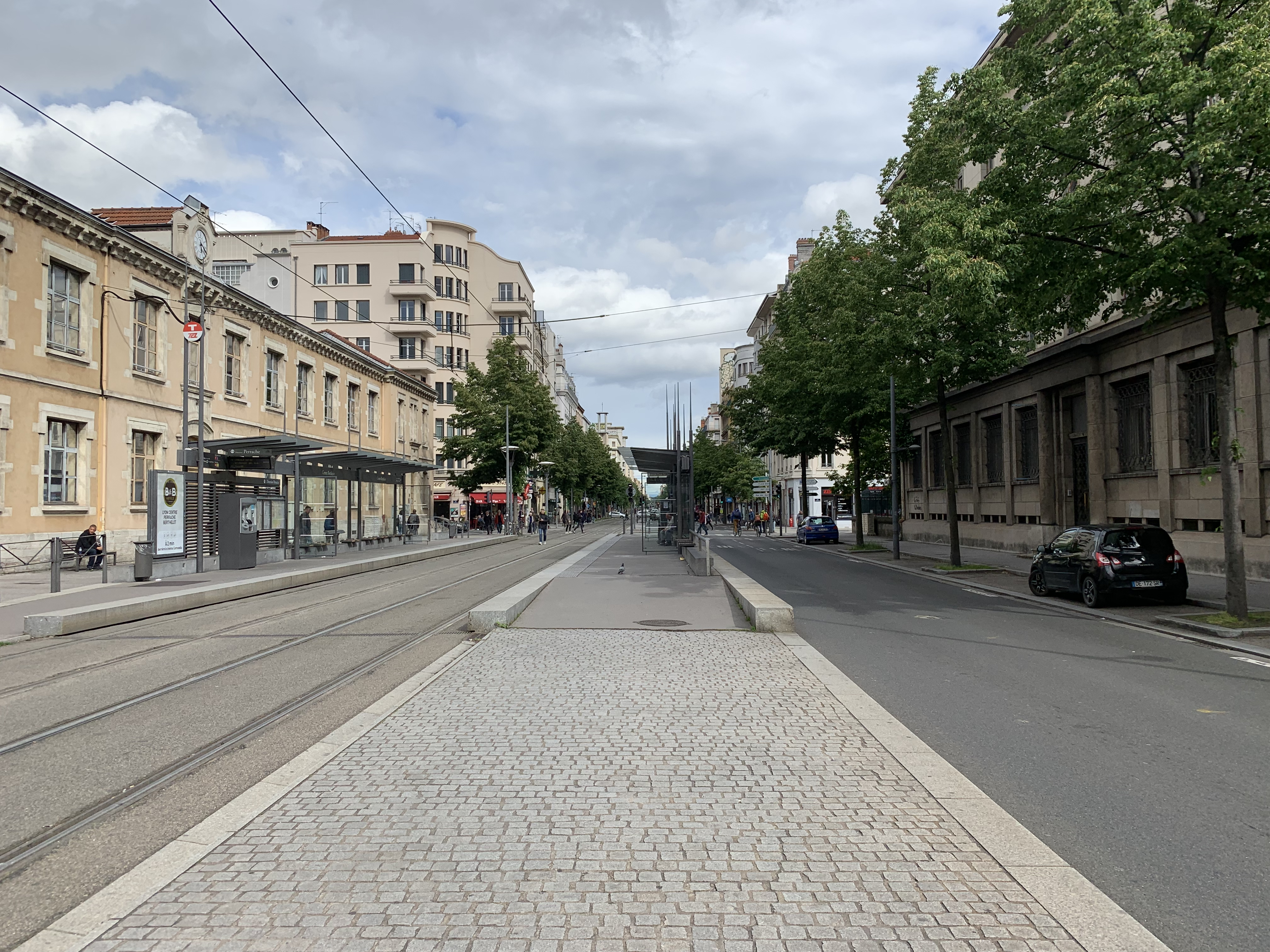 Avenue Berthelot (Lyon).